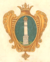 Симбирск, герб (1730)